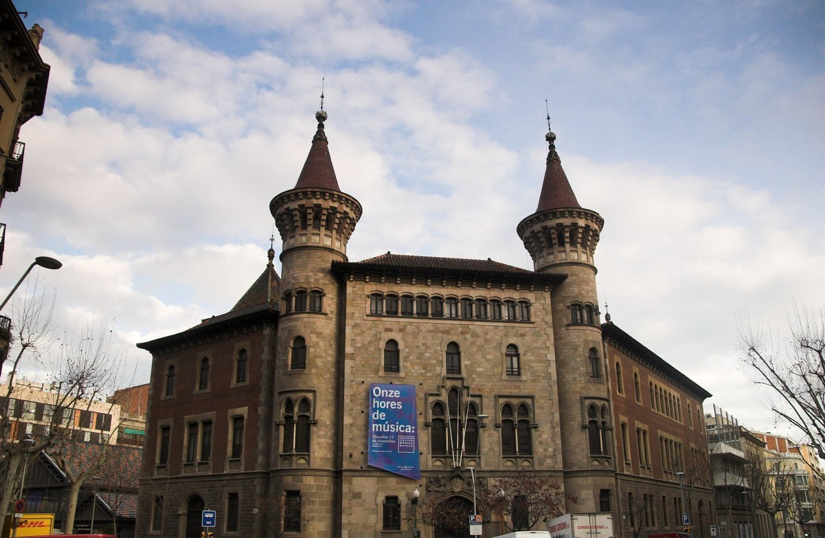 Escola de Música al c/ Bruc 104 (Barcelona-Catalunya), obra de Antoni Falguera 1916.